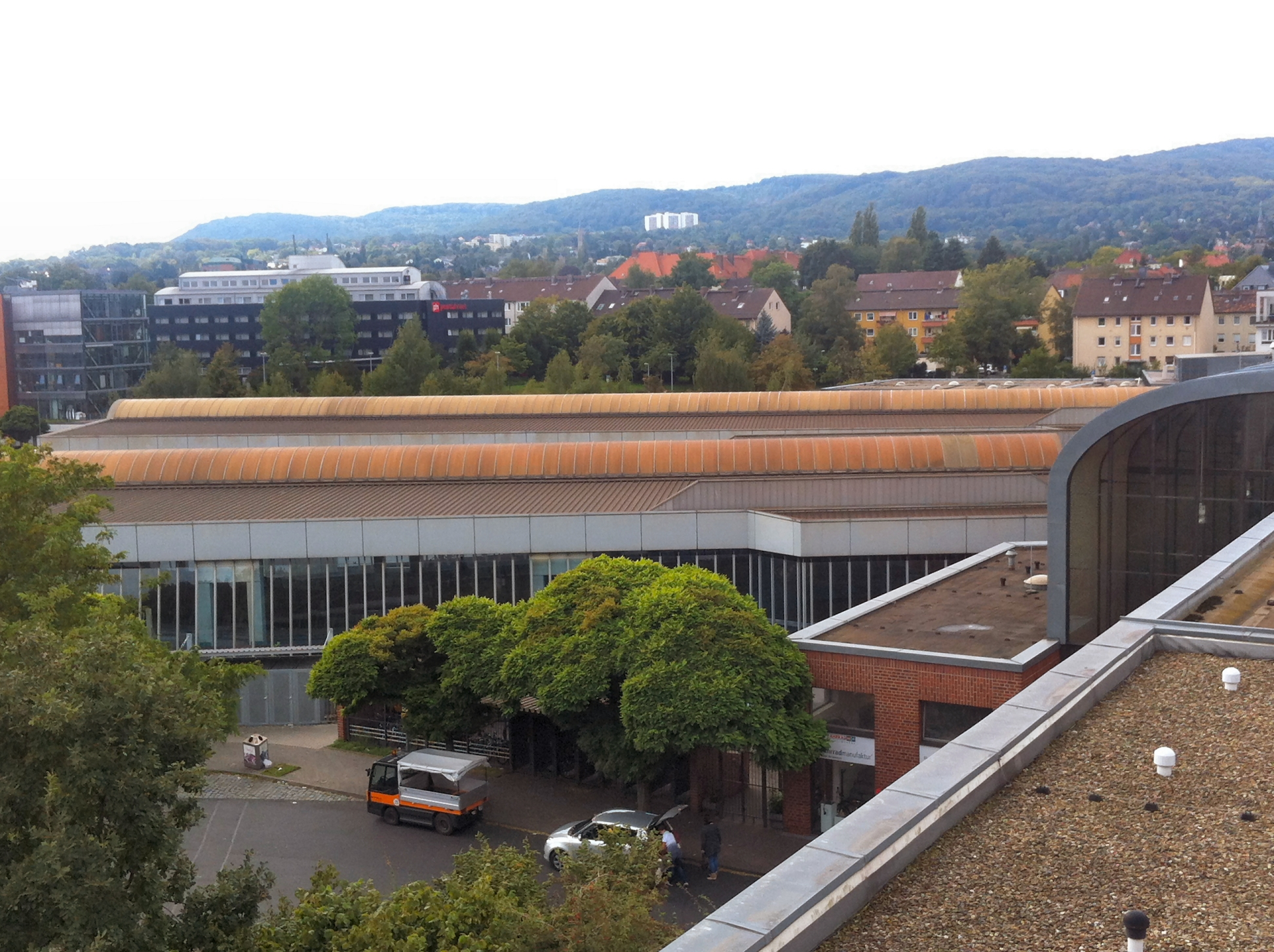 Bahnhof Kassel Wilhelmshöhe